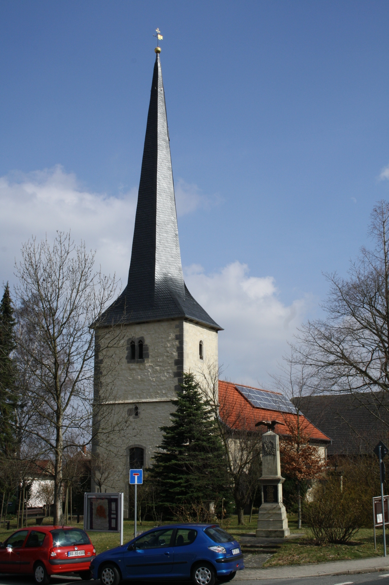 Evangelisch-Lutherische Versöhnungskirche zu Broitzem